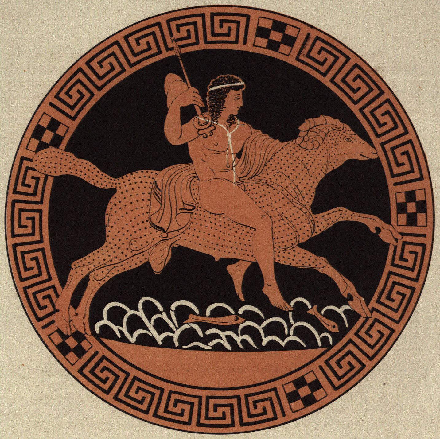 Phrixos und Chrysomallos. Reproduktion eines etruskischen rotfigurigen Vasenbildes im Besitz der Staatlichen Museen zu Berlin.